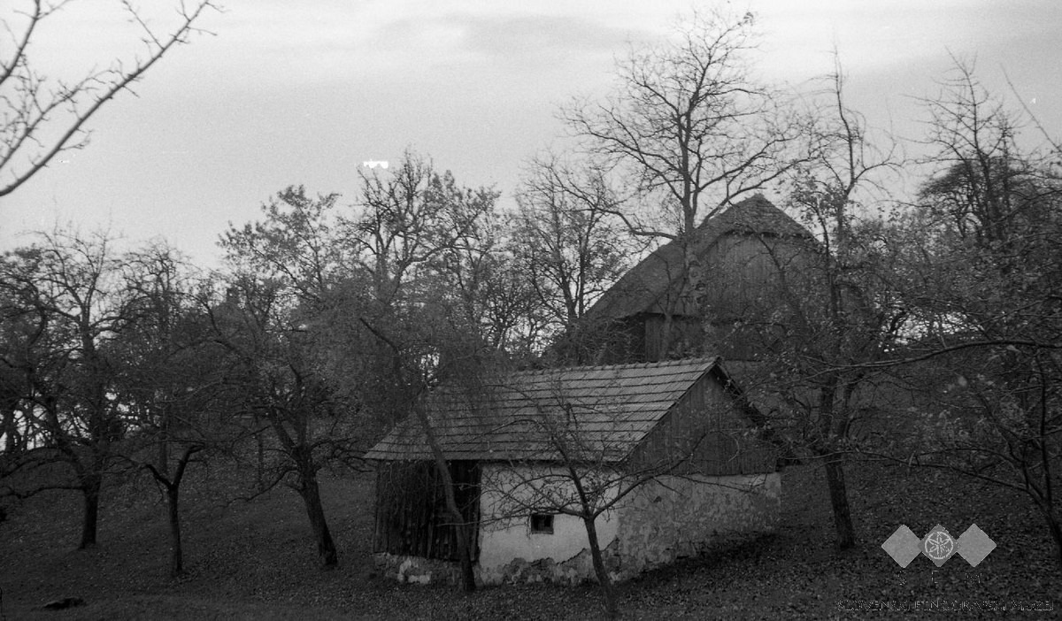 Pajštva (sušilnica) pri "Ropret", Malo Tinje.